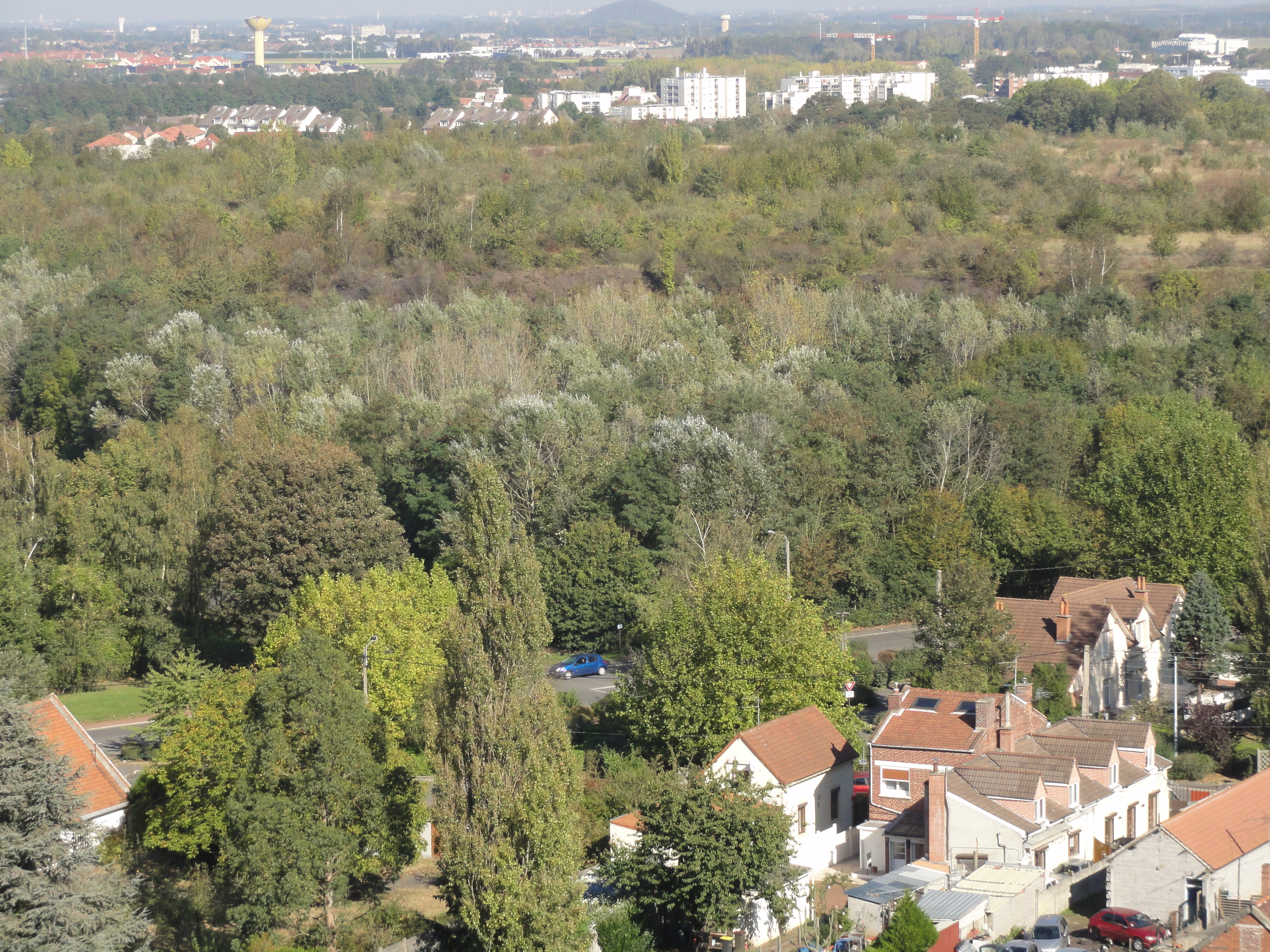 Terril n° 105 dit 6 bis de Dourges Est, fosse n° 6 bis de la Compagnie des mines de Dourges dans le bassin minier du Nord-Pas-de-Calais, Hénin-Beaumont, Pas-de-Calais, Nord-Pas-de-Calais, France.